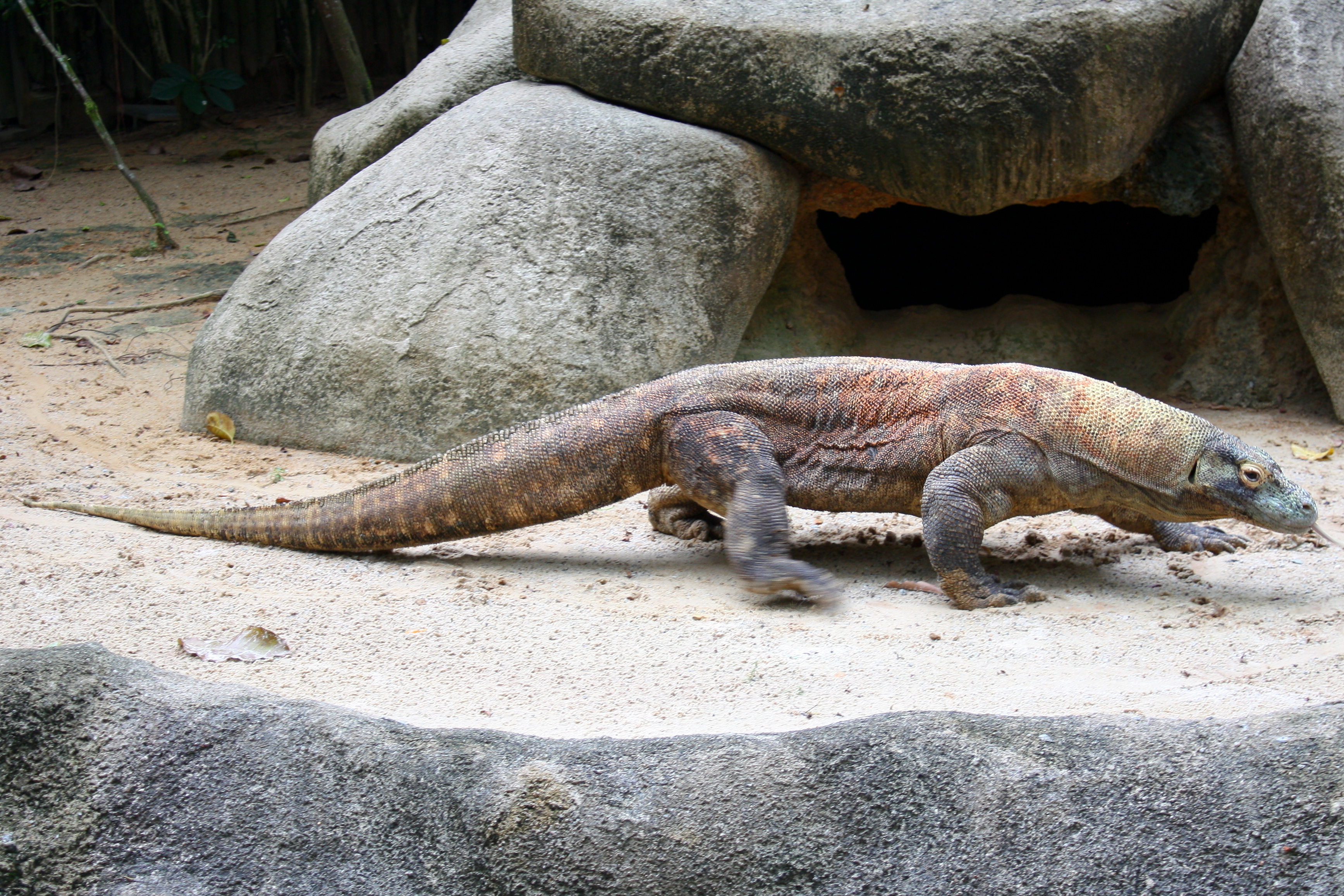 Komodo Dragon, Singapore Zoo